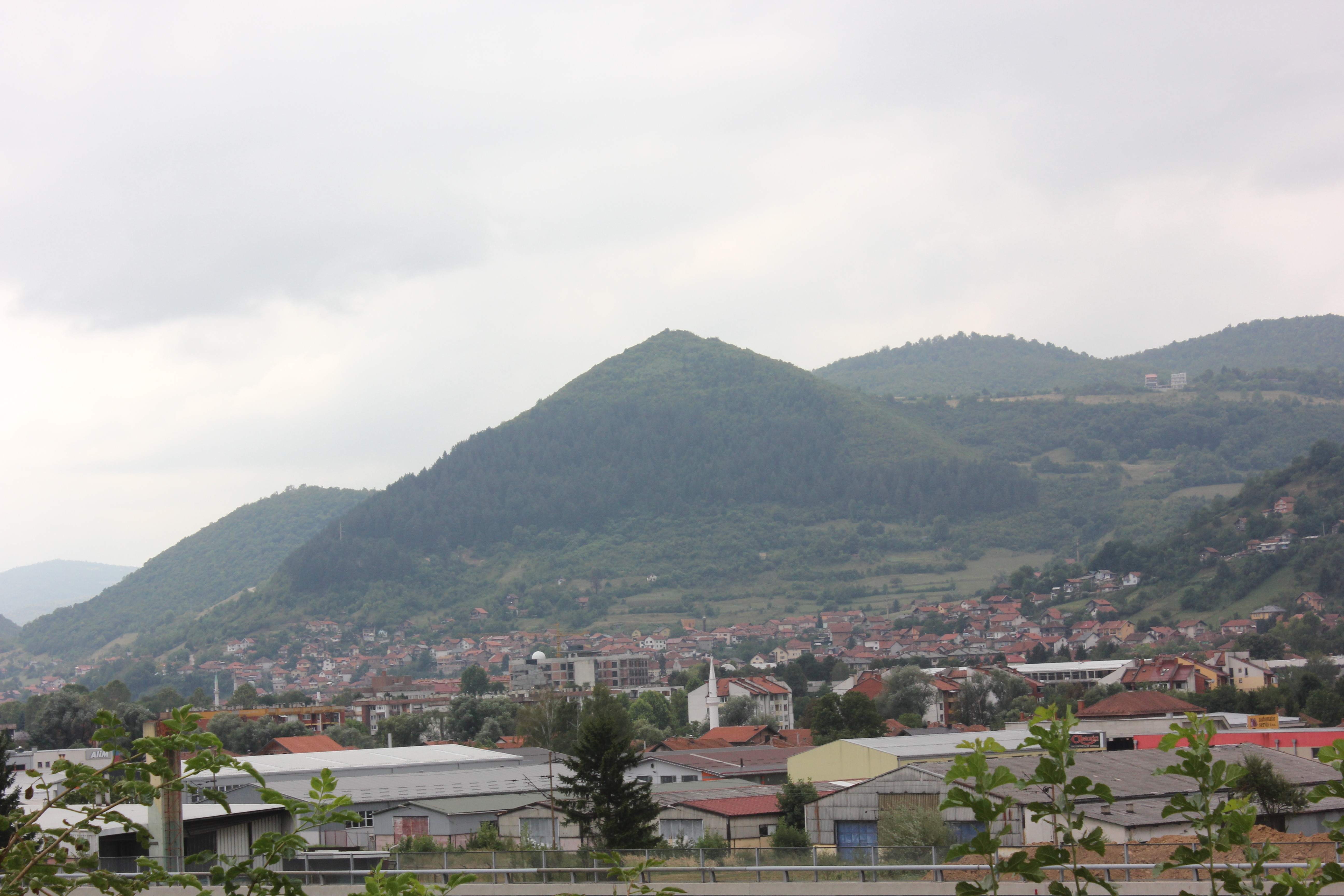 Hügel von Visoko mit Blick nach Süden